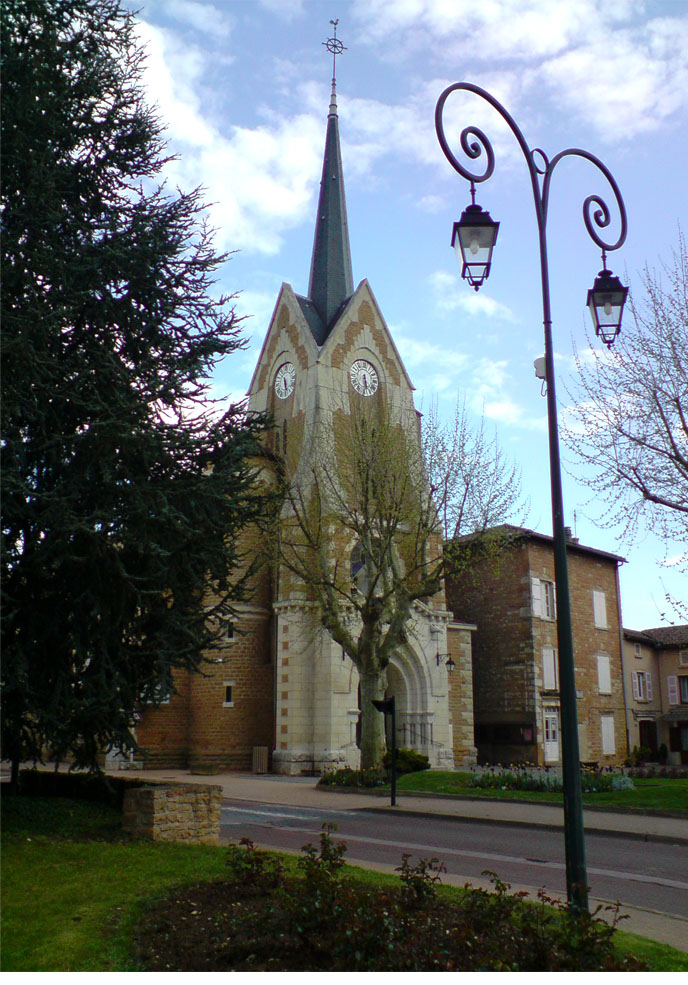 Église d'arnas (69).